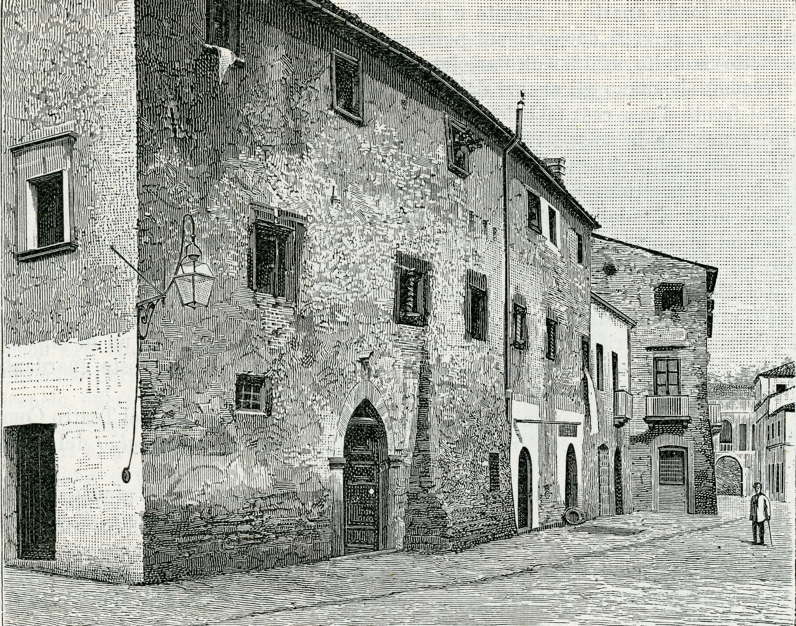 Teramo: casa dei Melatino del 1400 (incisore anonimo 1898).